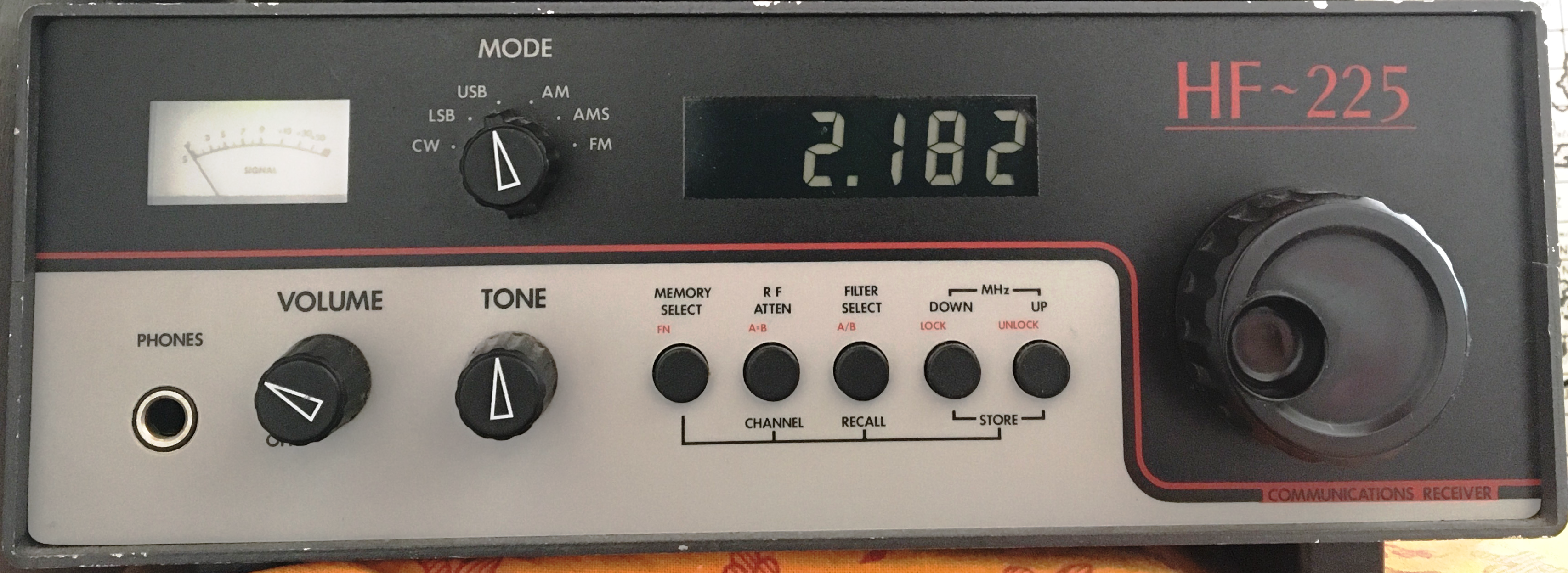 Récepteur sur 2182 kHz utilisé pour l'écoute des appels divers en USB et des messages de détresse. Récepteur Lowe HF225, 30kHz à 30MHz.